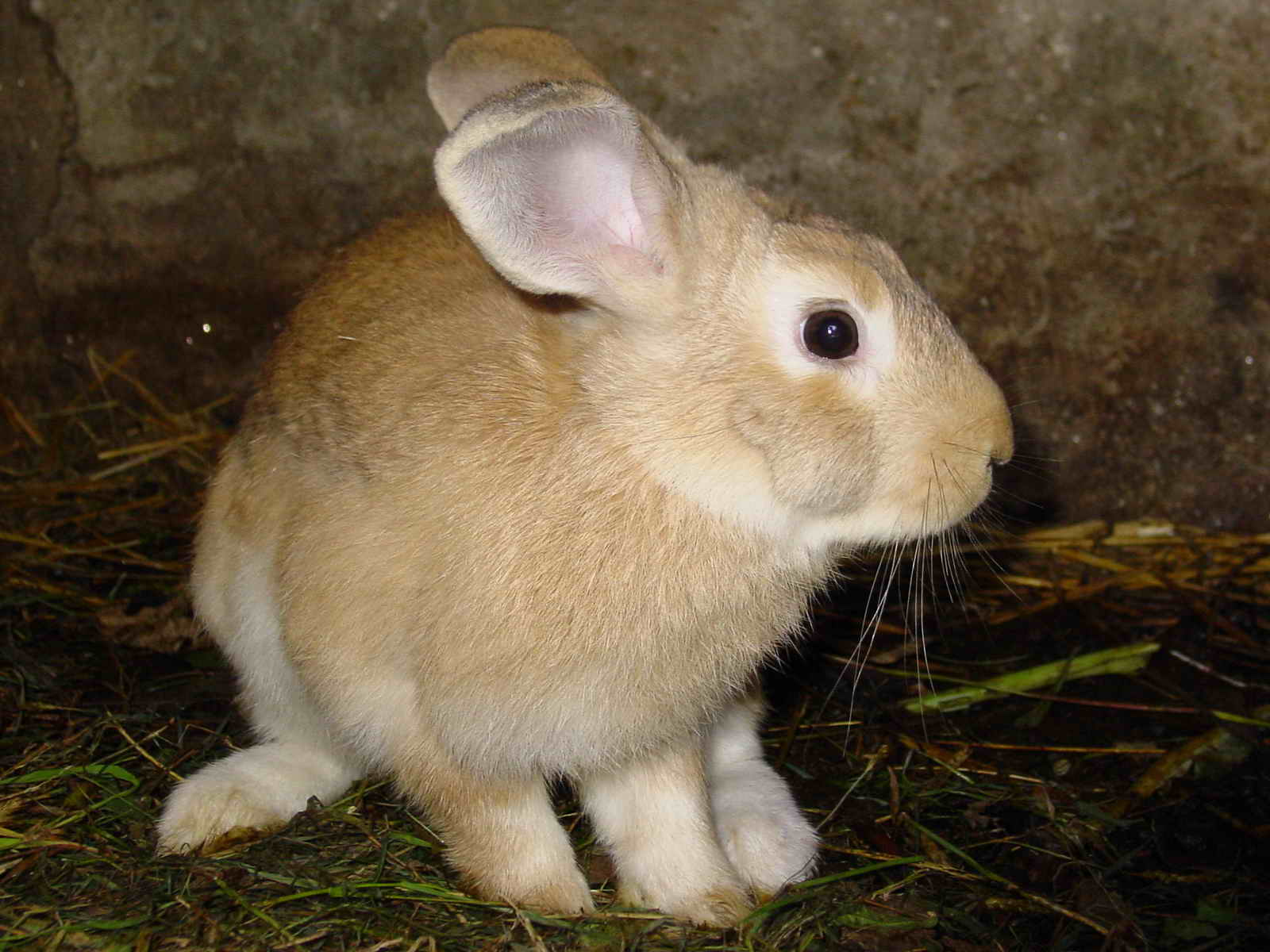 Teaño - Cuntis - Galicia - Spain